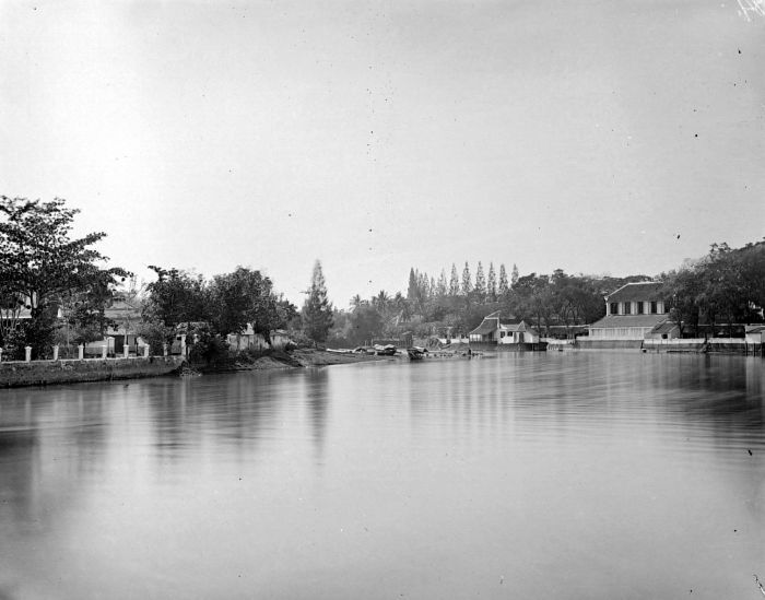 Negatief. Residentiehuis aan het water, Surabaya